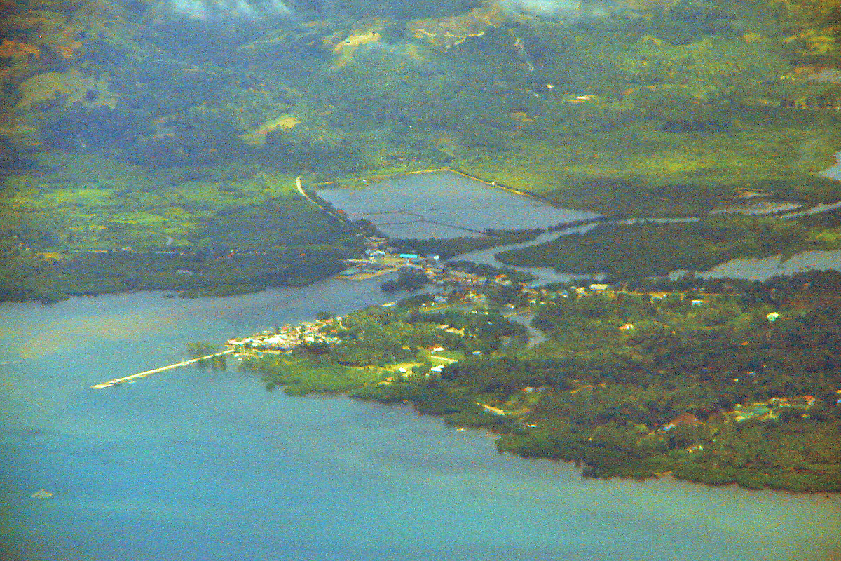 Buenavista, Bohol, Philippines